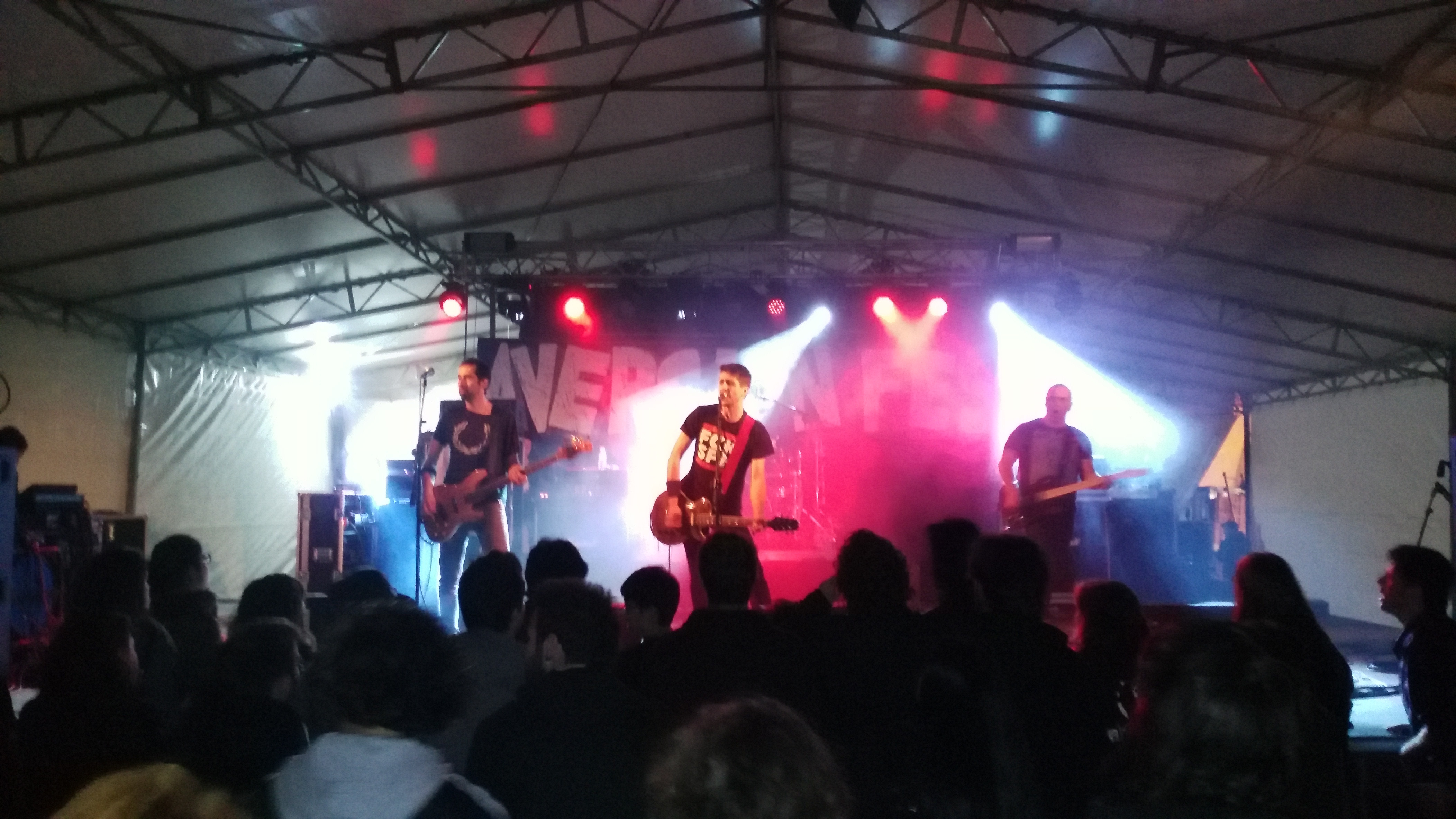 O grupo estradense NAO no Aversion Fest 2015, en Burela.